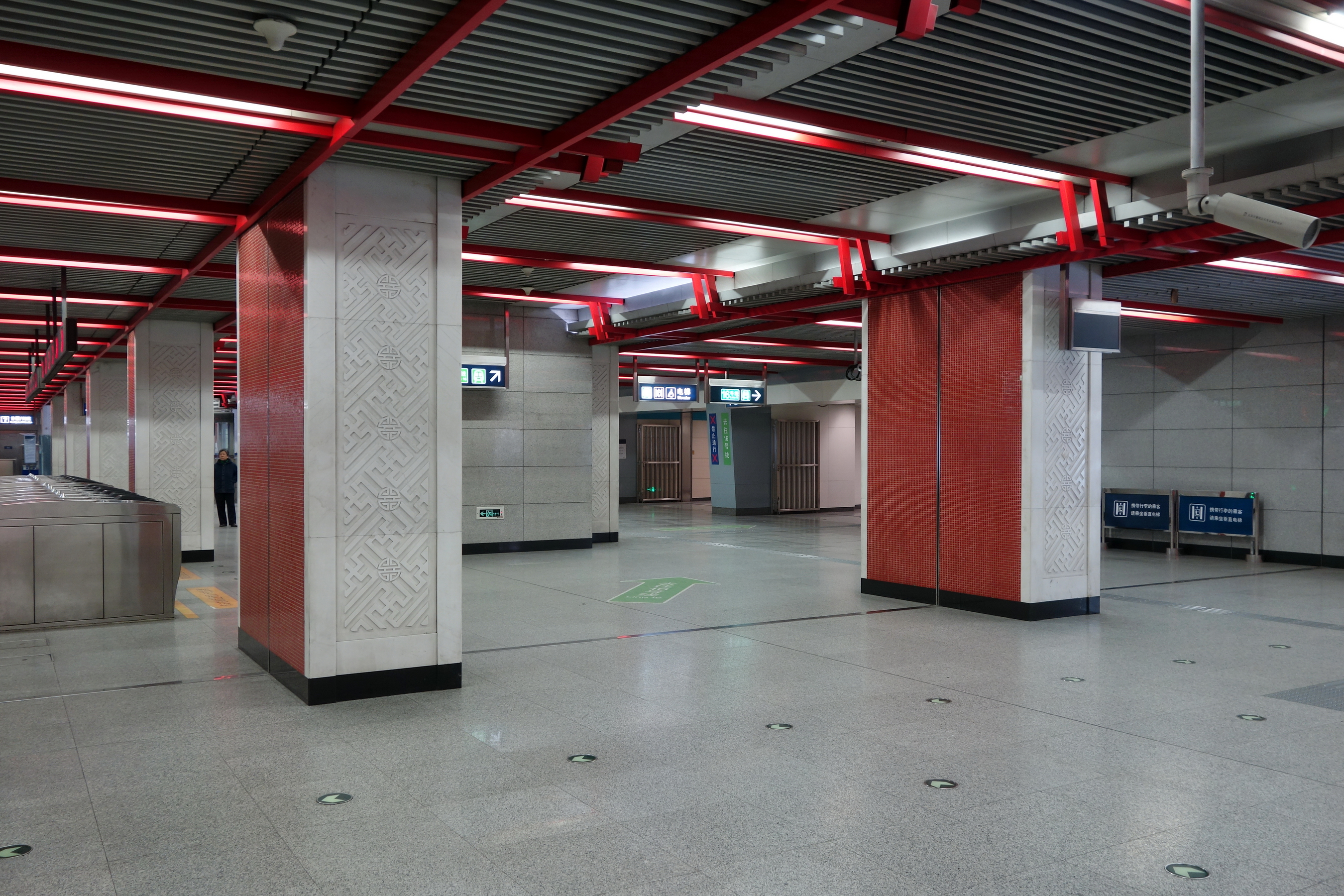 北京地铁4号线西苑站站厅